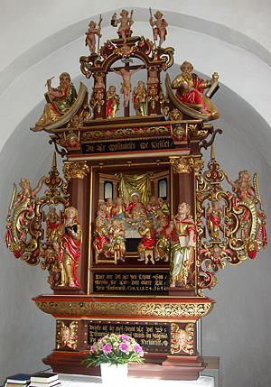 Odder Kirke, Hads Herred, Århus Amt - Altertavle